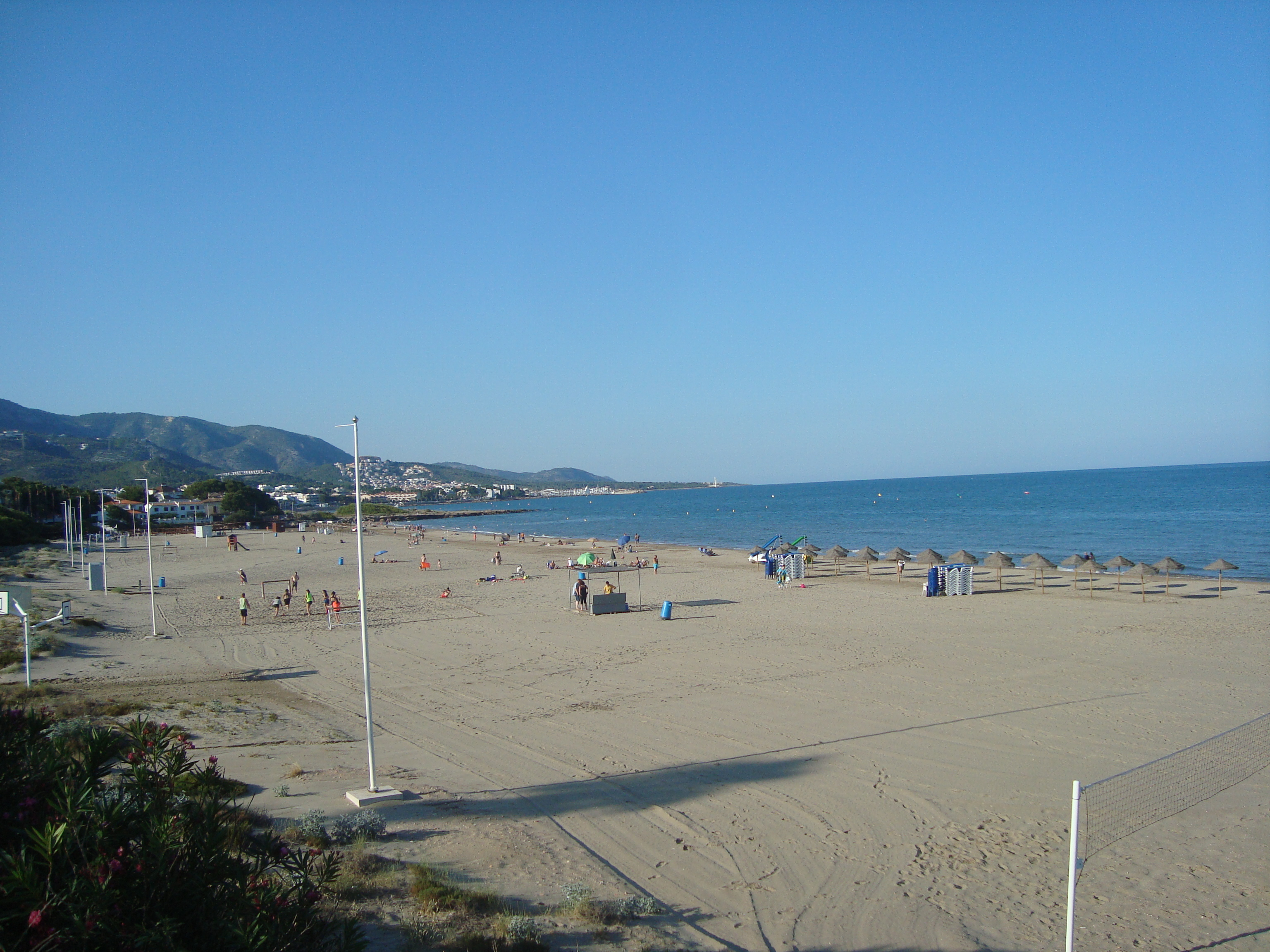 Platja de la Romana (Alcalà de Xivert) This is a a photo of a beach in the Land of Valencia, Spain, with id: PL-1413